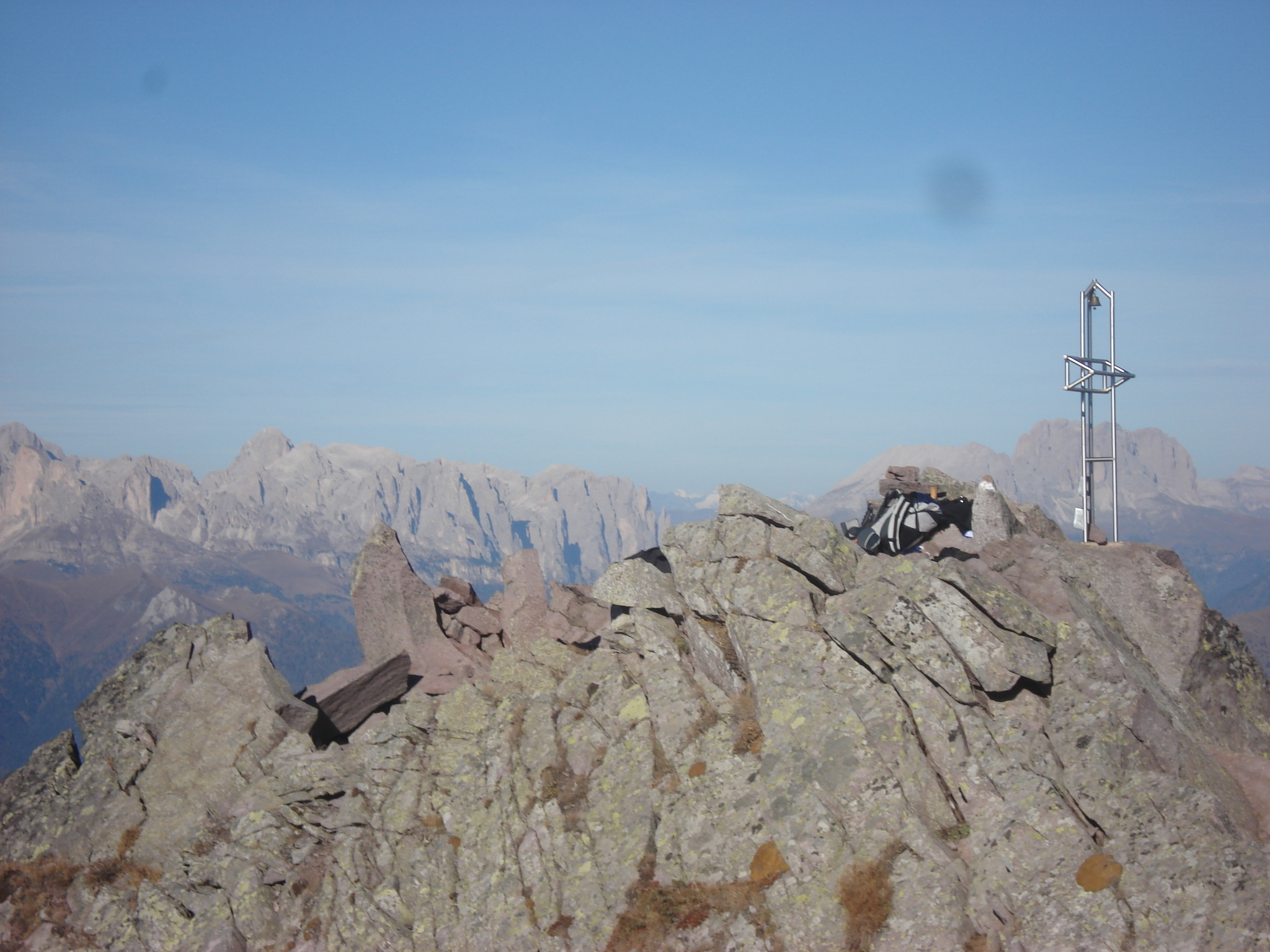 cima cardinal 2481m